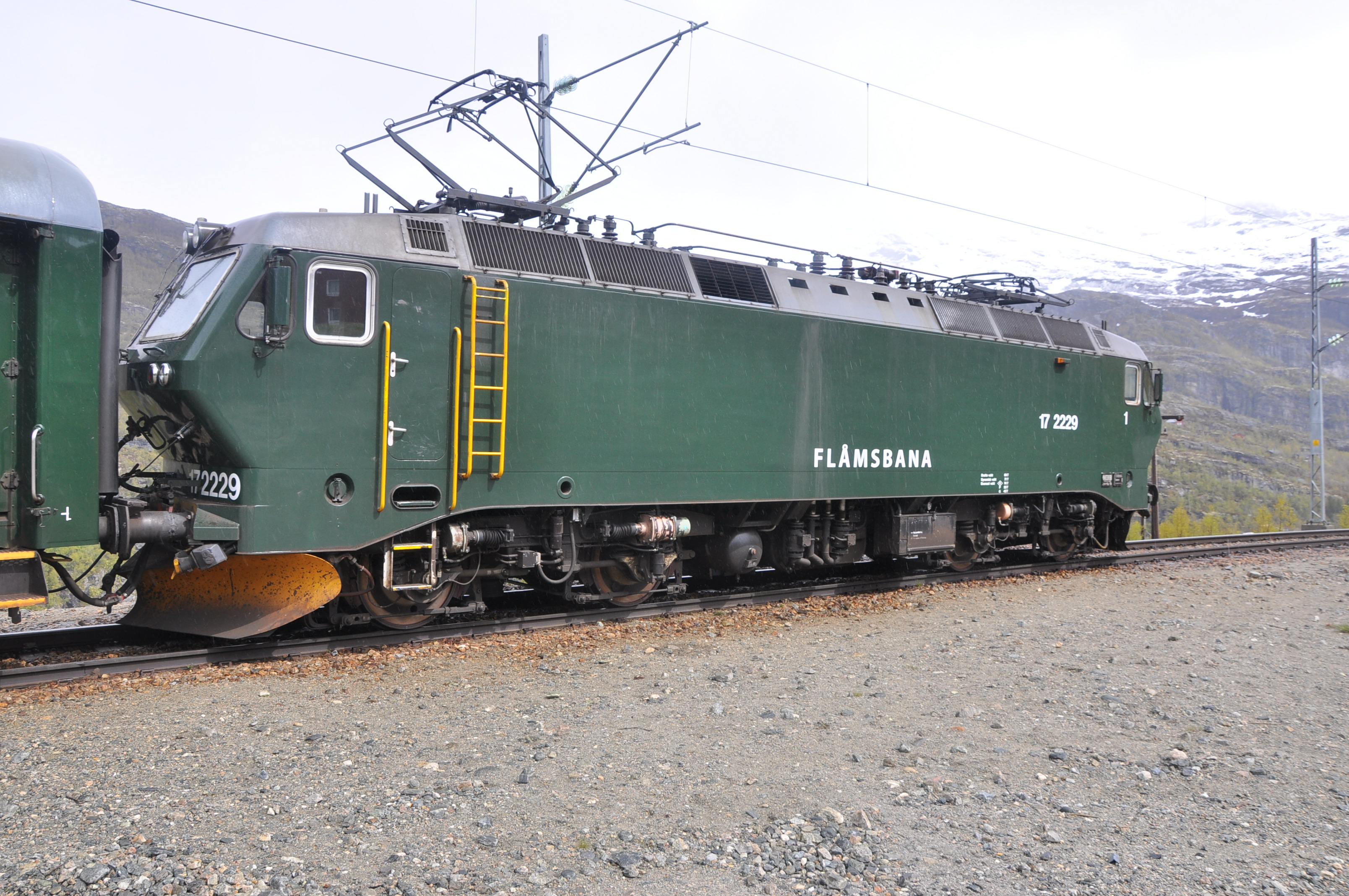 Lokomotiv på Flåmsbana, NSB El 17